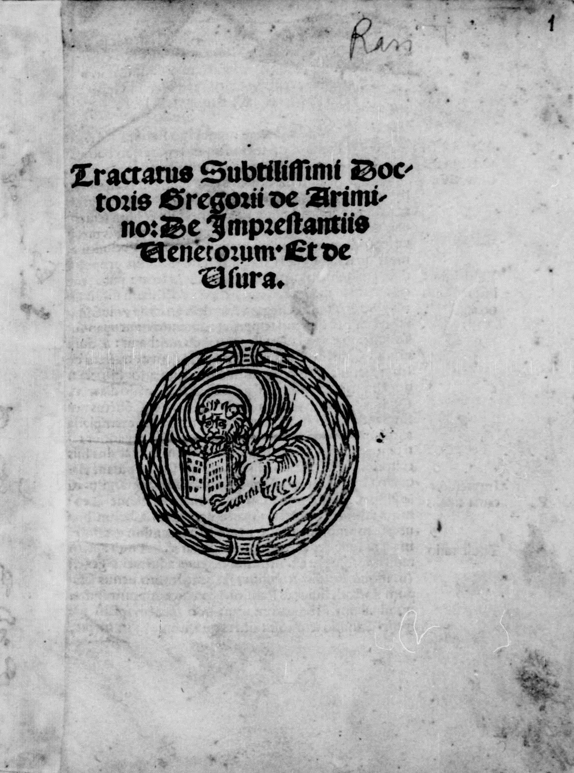 Frontespizio